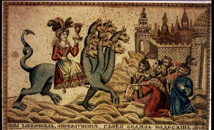 Russian engraving